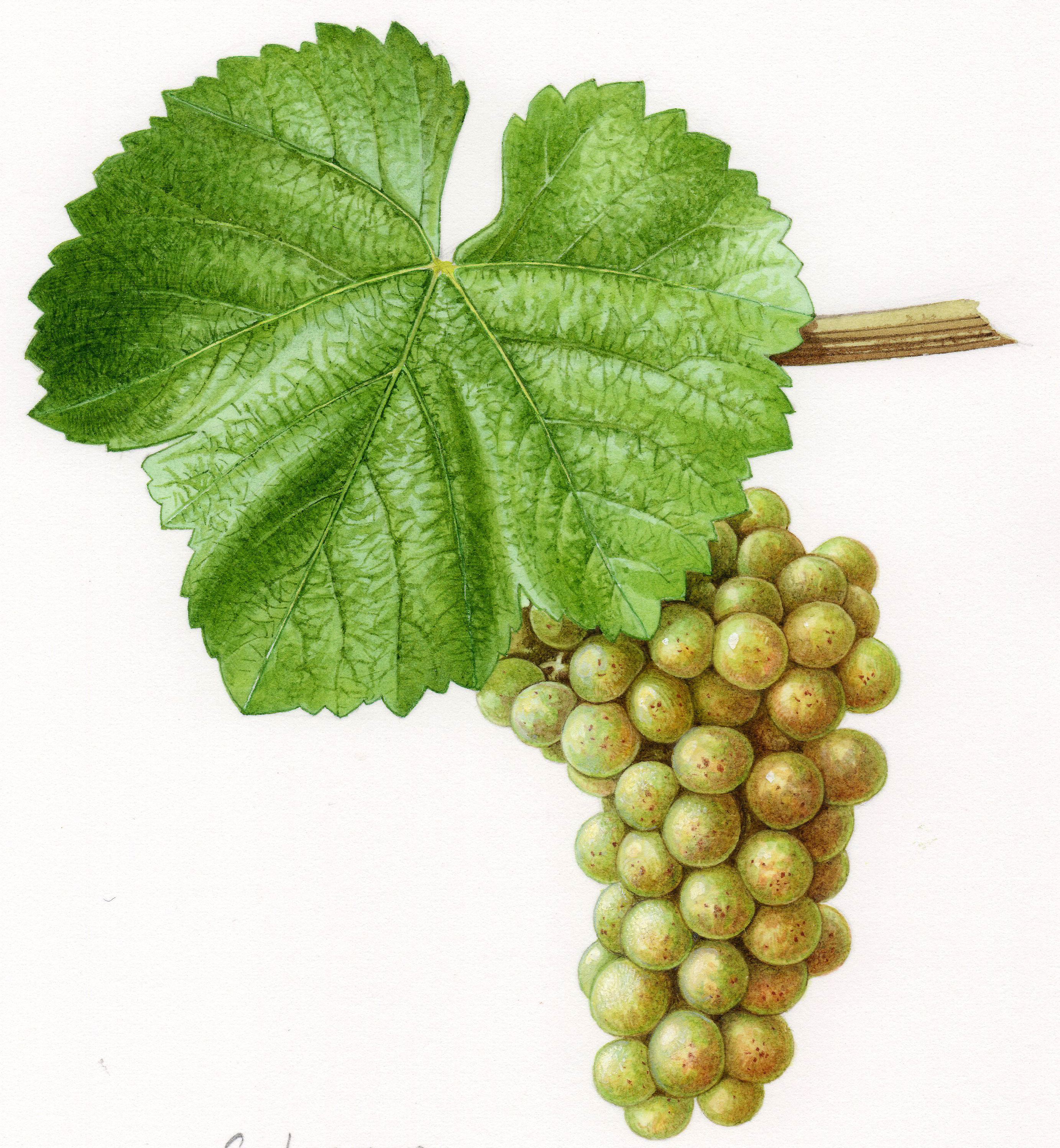 Aquarelle originale pour les Cépages de France (2001)